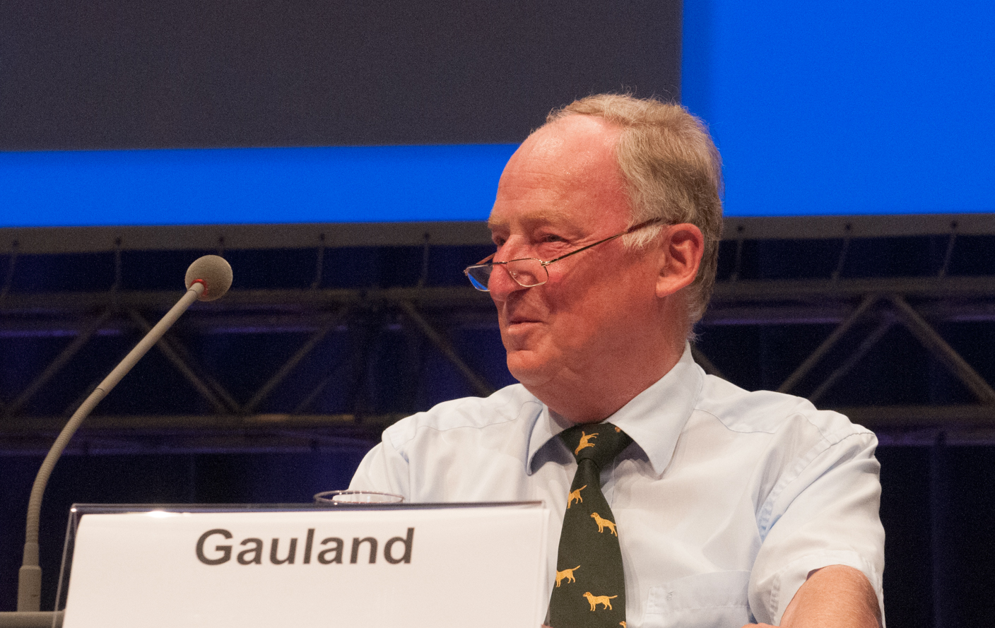 a.o. Bundesparteitag der Alternative für Deutschland, 4. Juli 2015 in Essen, Gruga Halle a.o. Bundesparteitag der Alternative für Deutschland am 4./5. Juli 2015 in Essen, Gruga Halle